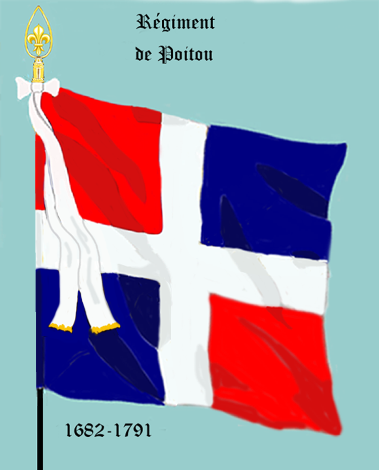 Ordonnanzfahne eines königlich französischen Infanterie-Regiments. - Entnommen und überarbeitet aus: „LES UNIFORMES ET LES DRAPEAUX DE L'ARMÉE DU ROI“ Marseille 1899. (Drapeau d'Ordonnance d' un régiment française d'infanterie royale.)